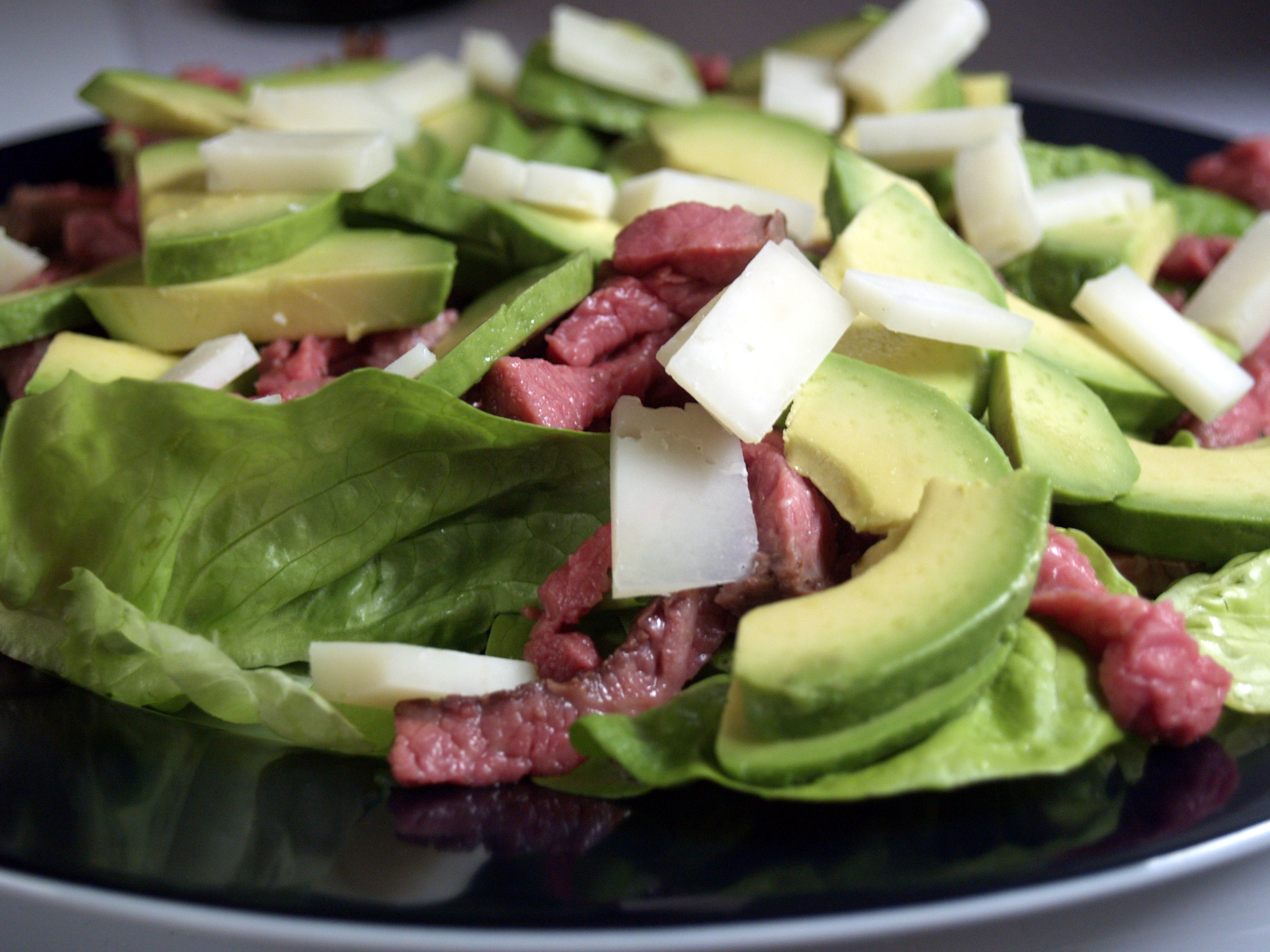 Salat med oksekød, gedeost og avocado